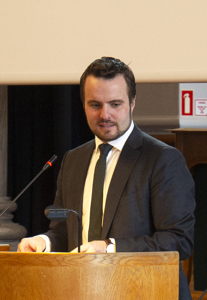 Photo: News Øresund - Camilla Neve © News Øresund - Camilla Neve (CC BY 3.0) Detta verk av News Øresund är licensierat under en Creative Commons Erkännande 3.0 Unported-licens (CC BY 3.0). Bilden får fritt publiceras under förutsättning att källa anges. .The picture can be used freely under the prerequisite that the source is given. News Øresund, Malmö, Sweden News Øresund är en oberoende regional nyhetsbyrå som är en del av det oberoende dansk-svenska kunskapscentrat Øresundsinstituttet. Detta foto har tillkommit i samband med Øresundsinstituttets medverkan i Interregprojektet GC Life science analysis initiative. Simon Kollerup